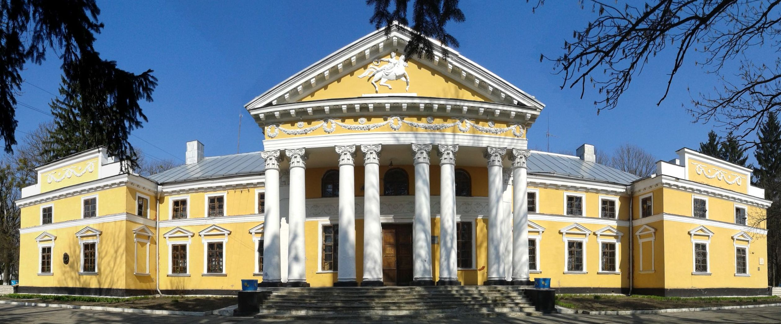 Дворец в усадьбе Ганских. Парадный фасад. Сшит из нескольких снимков. с. Верховня. Ружинский район. Житомирская область. Украина.